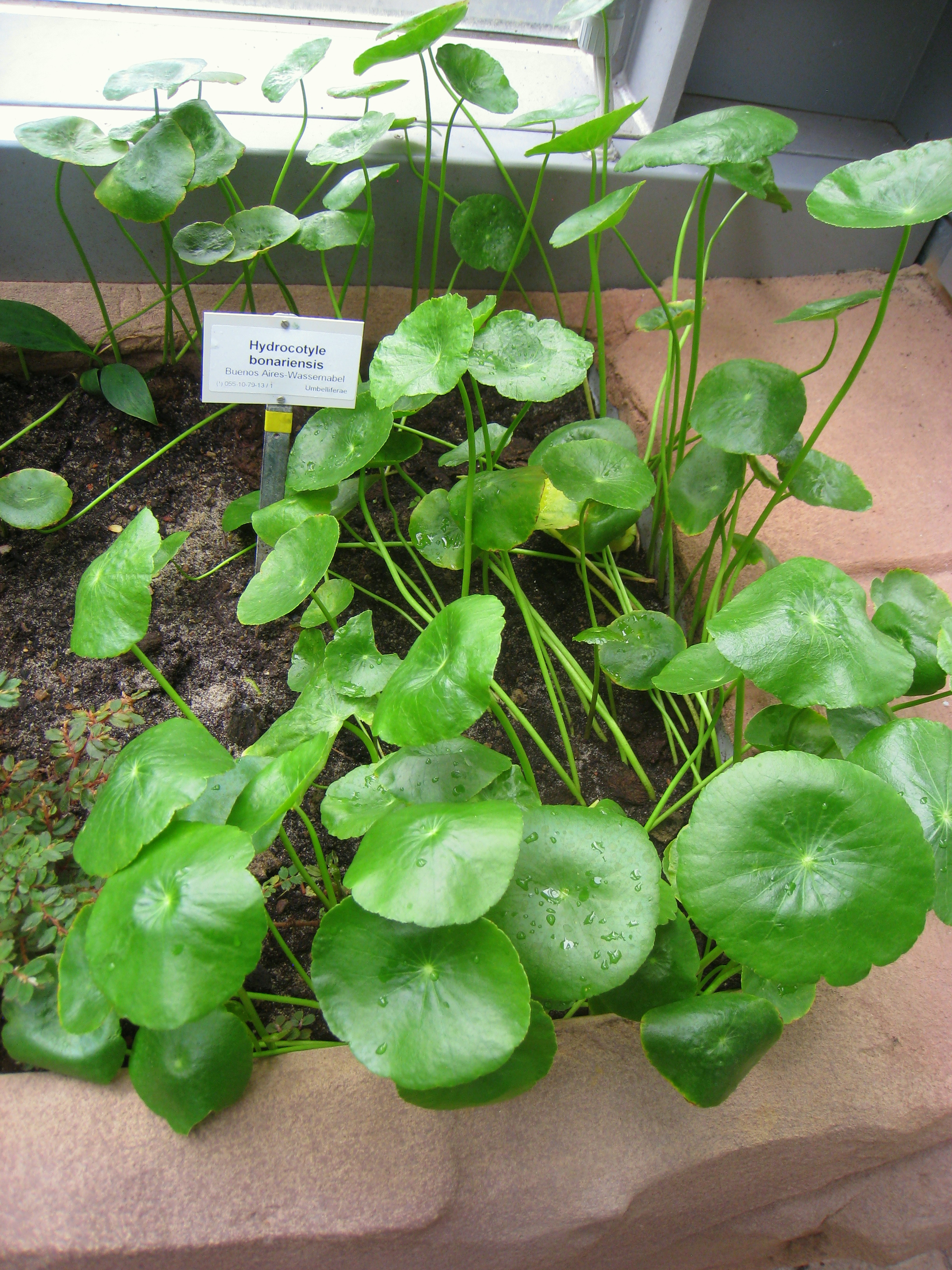 Hydrocotyle bonariensis specimen in the Botanischer Garten, Berlin-Dahlem (Berlin Botanical Garden), Berlin, Germany.